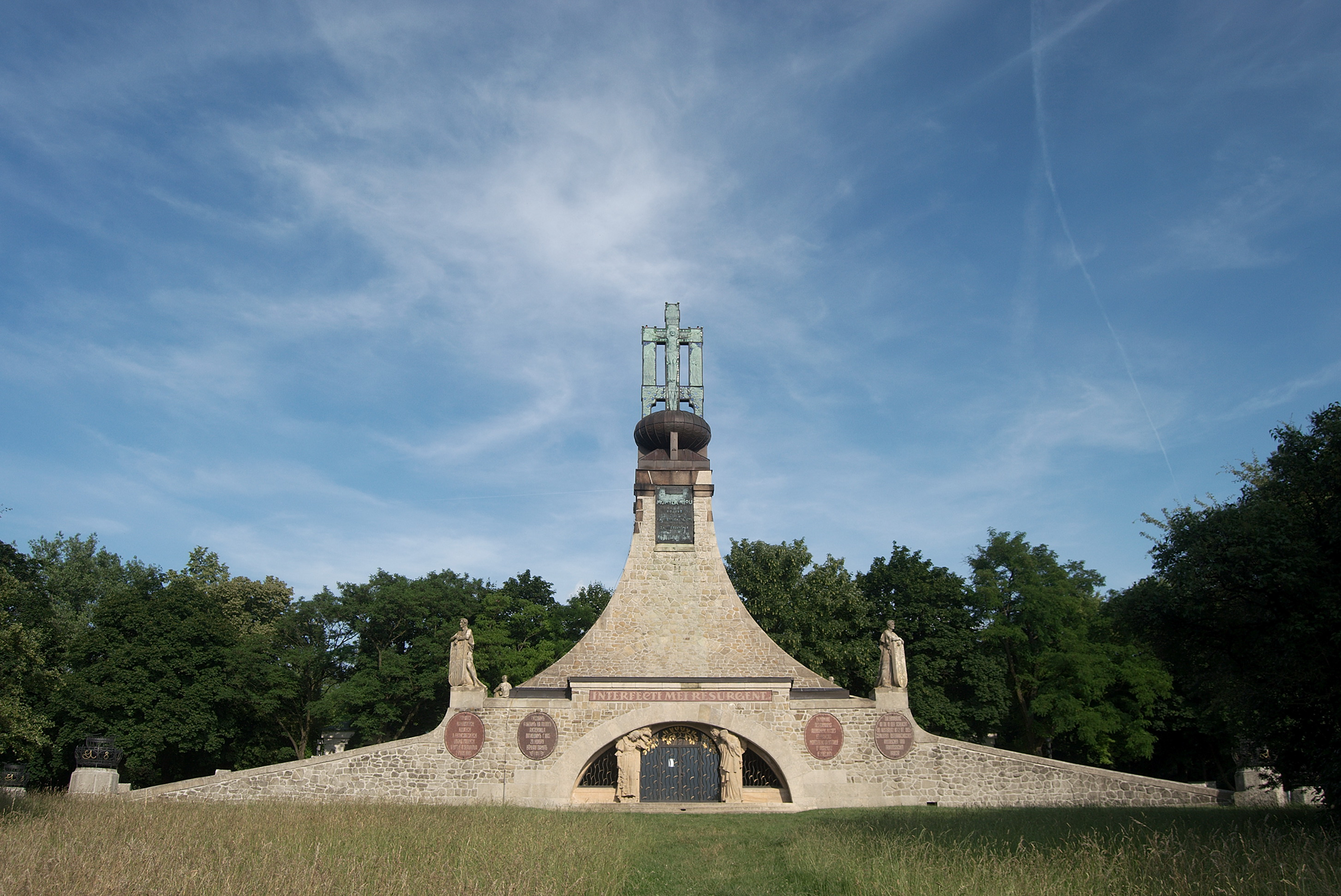 Mohyla míru od západu